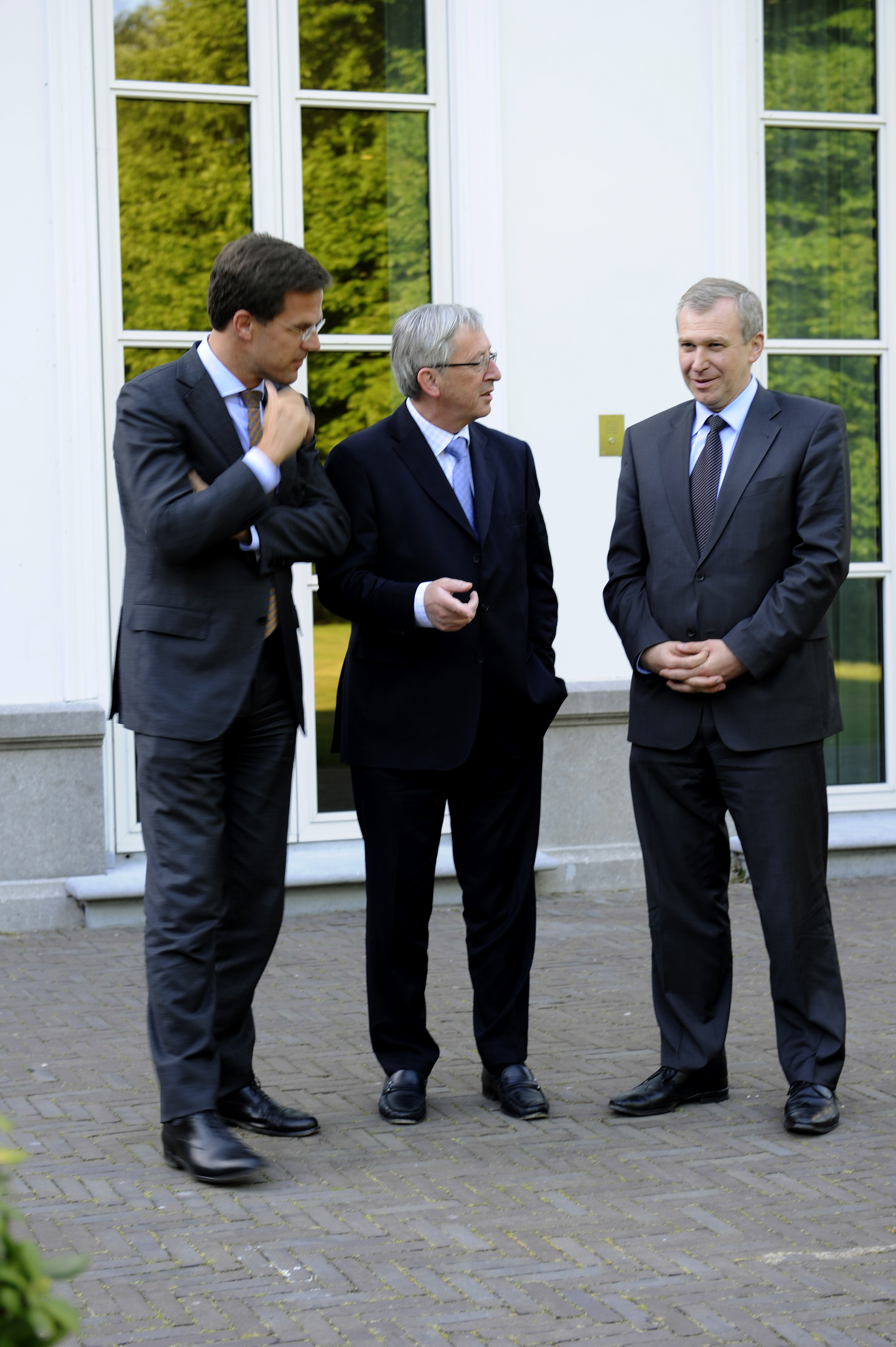 Minister-president Rutte samen met zijn Benelux-collega’s Leterme en Juncker op het terras van het Catshuis.